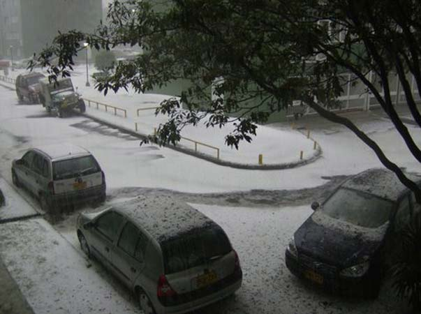 Hailstorm bogota